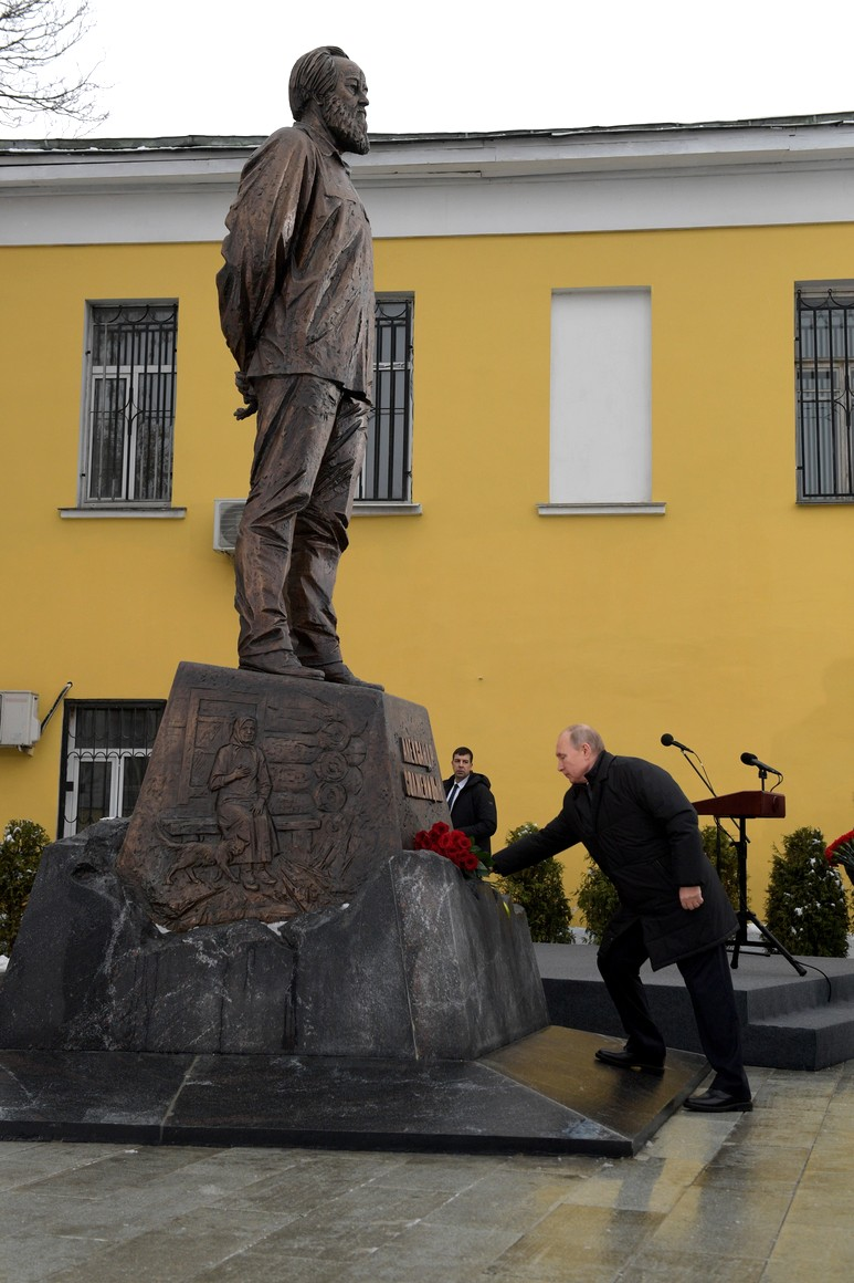 Президент Российской Федерации на открытии памятника Александру Солженицына в Москве. 11 декабря 2018 года